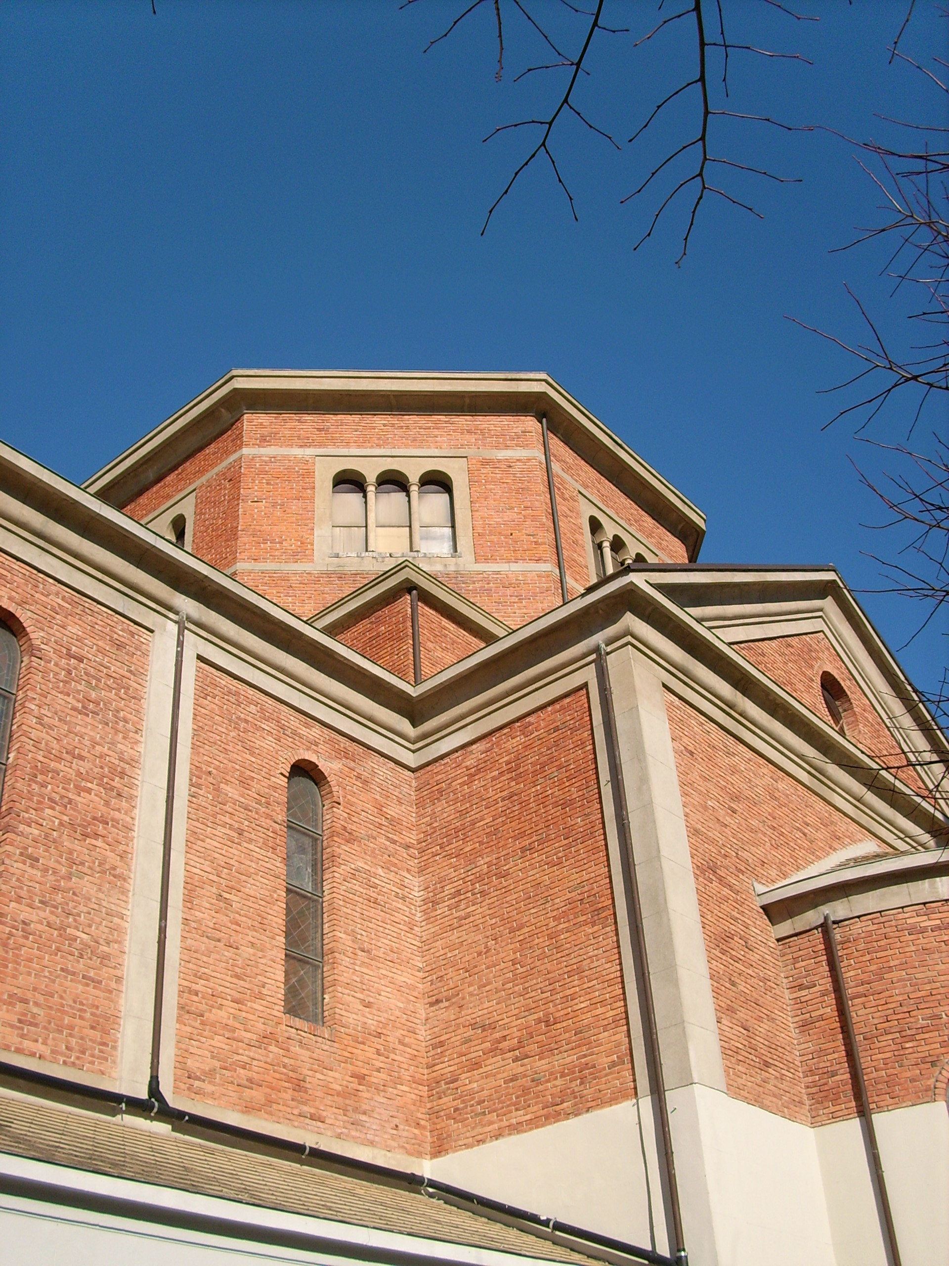 Santuario di Nostra Signora della Guardia, Levanto, Liguria, Italia